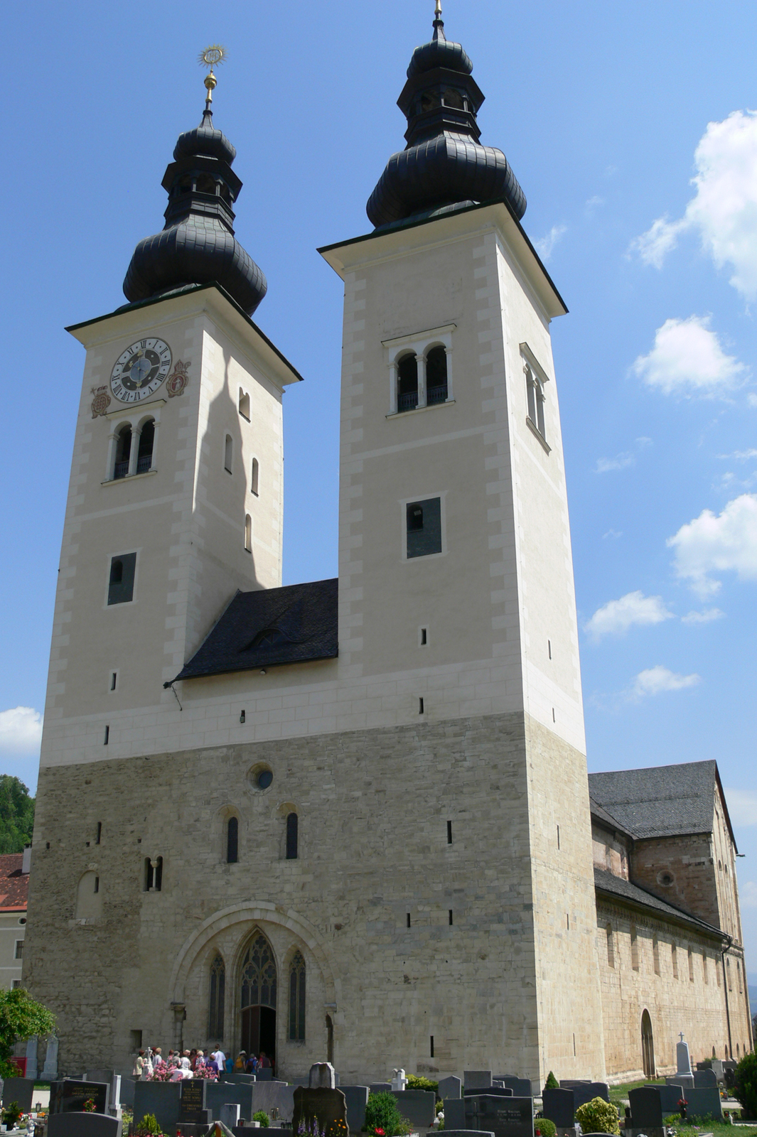 Gesamtanlage Domstift Gurk mit Befestigungsanlagen und archäologischem Fundhoffnungsgebiet